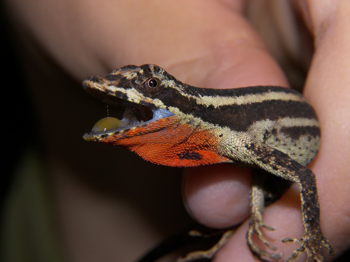 Norops vittigerus